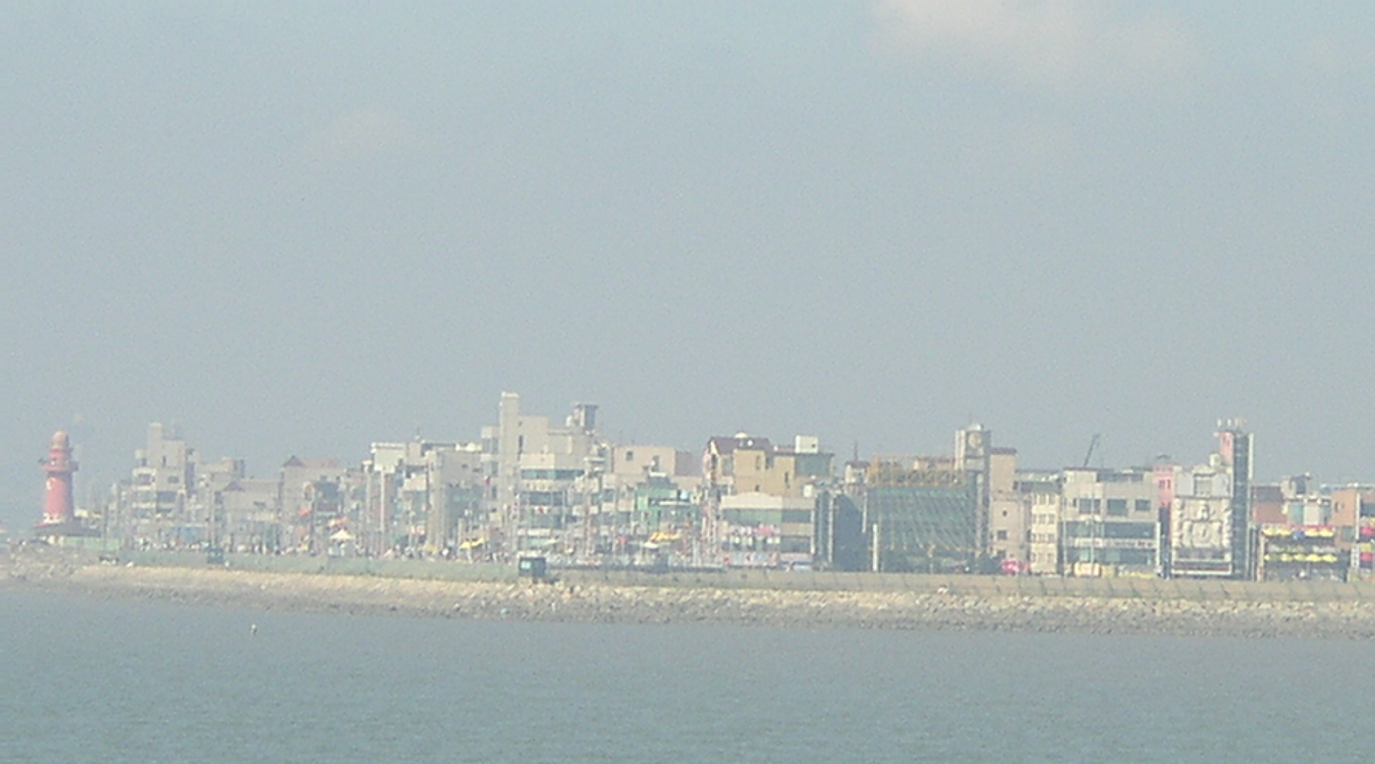 시화 공단의 전경, 시화방조제에서 본 모습, 시흥시 소재